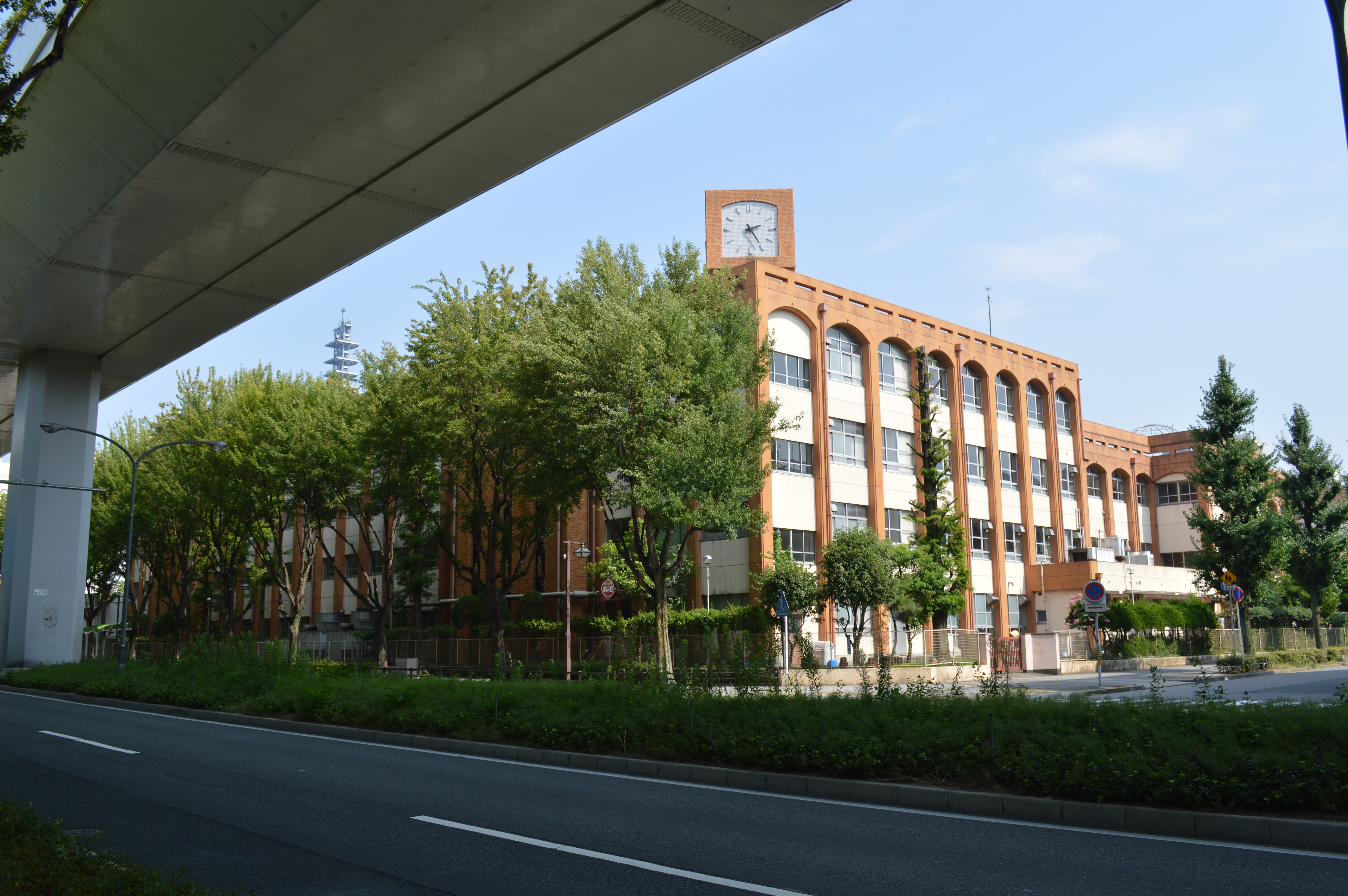 愛知県名古屋市中区の名古屋市立名城小学校と外堀通